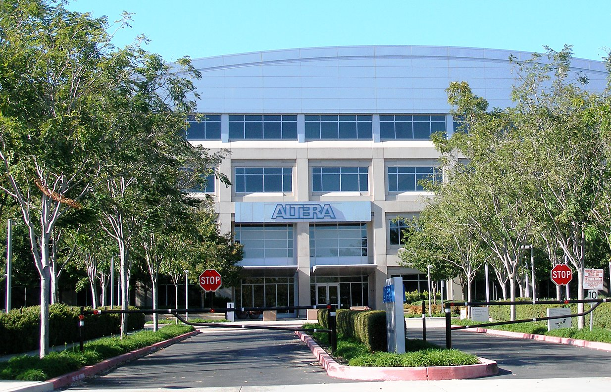 Altera head-quarters (San Jose)